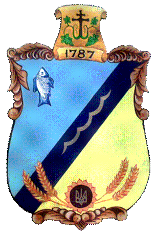 Герб смт Горностаївка: Офіційний герб селища міського типу Горностаївка